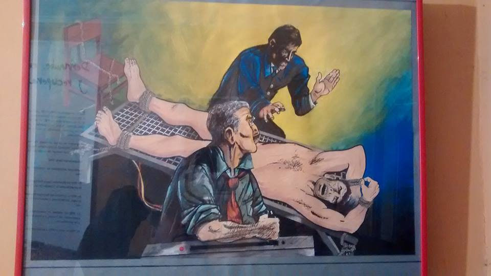 El Museo Centro Clandestino de detención y tortura "Nido 20", se encuentra ubicado en la comuna de La Cisterna, Chile. Usado por el Comando Conjunto, célula represora formada por elementos perteneciente a la Fuerza Aérea y Carabineros de Chile.